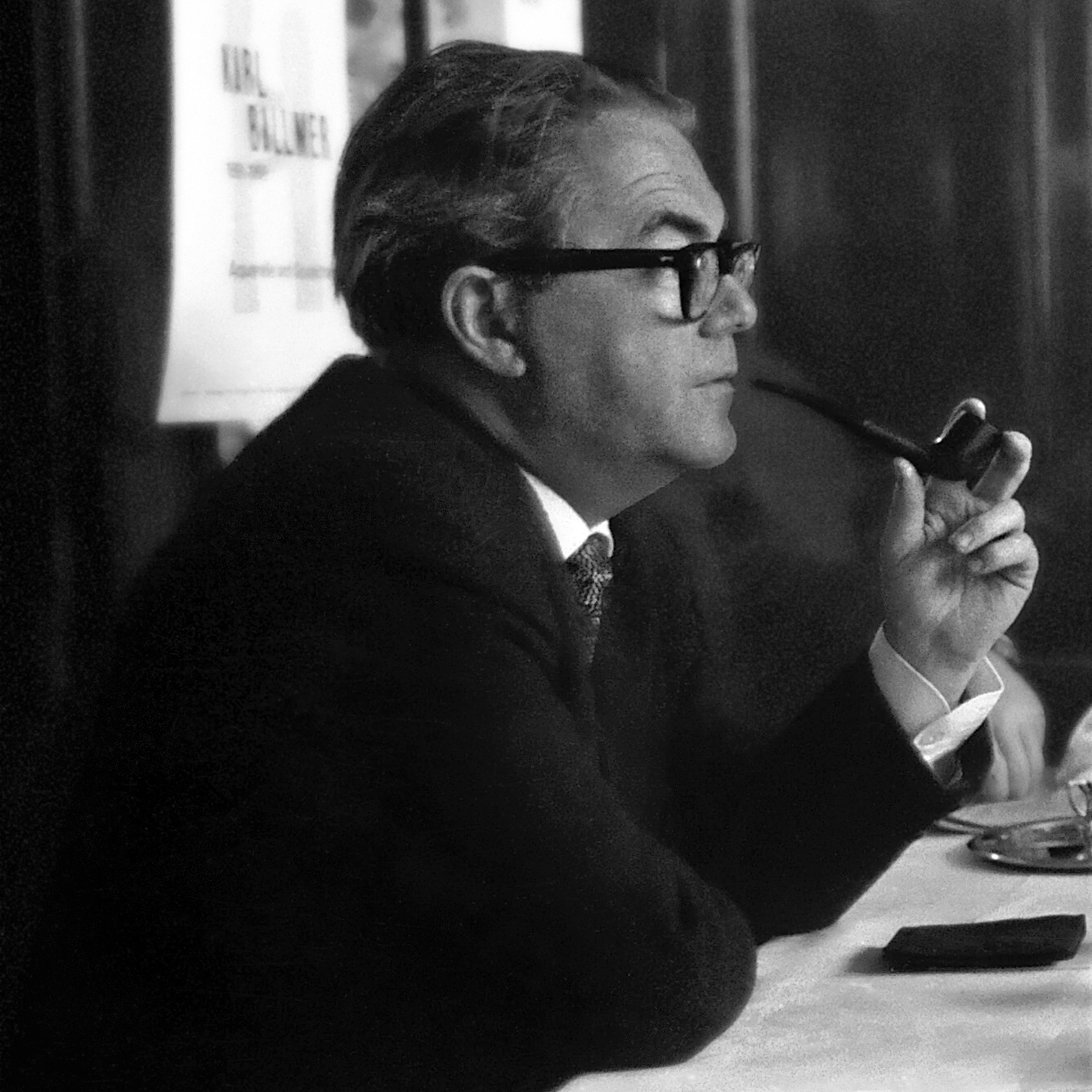 Bildausschnitt